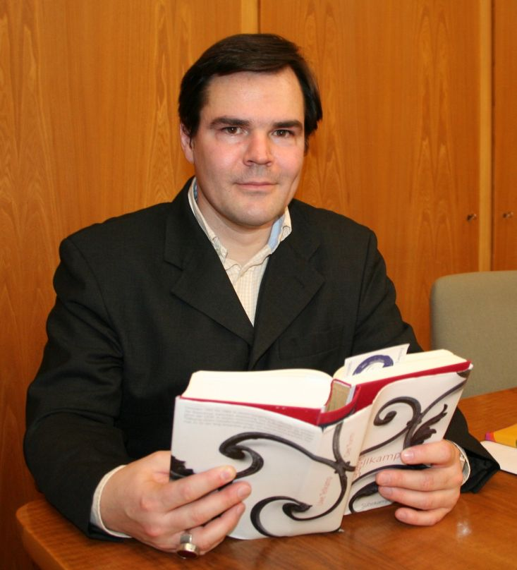 Uwe Tellkamp nach einer Lesung aus seinem Roman Der Turm im Wormser Rathaus